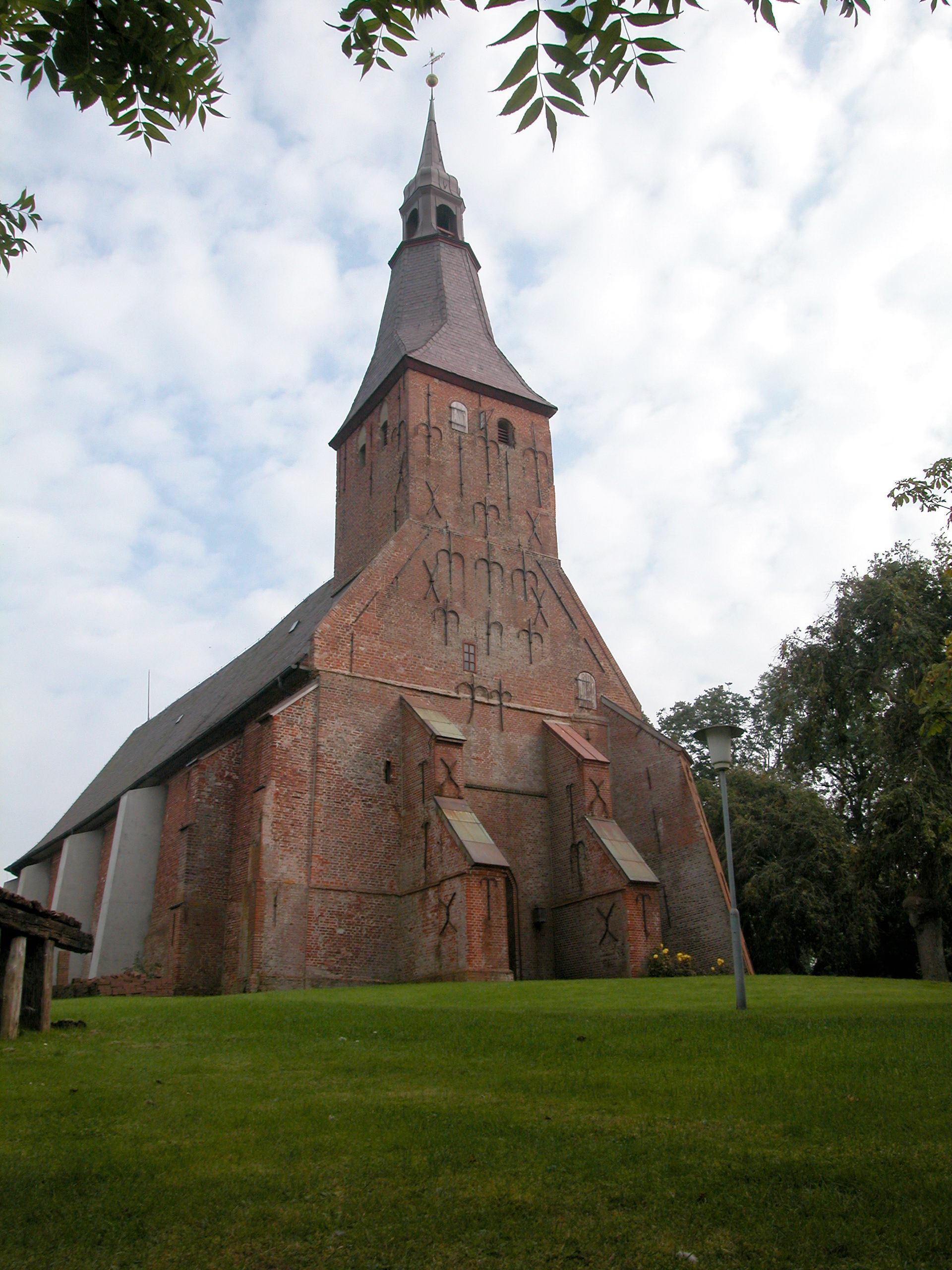 Tetenbüll, St. Anna Standort:54°21′7.9″N 8°49′30.6″E / 54.352194°N 8.825167°E